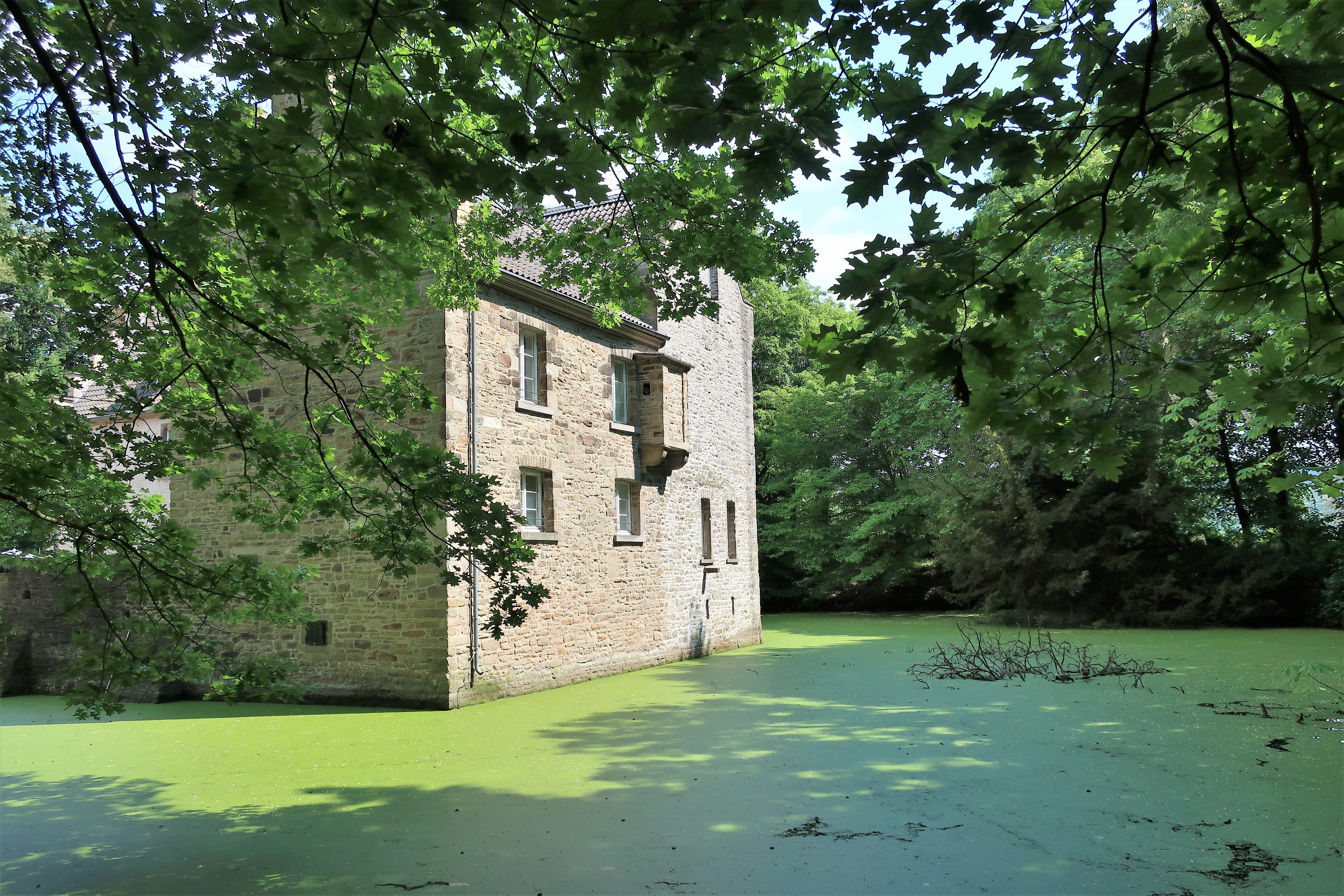 Blick auf die Westseite von Schloss Werdringen in Hagen-Vorhalle, Brockhauser Straße. Das Schloss liegt im geschützen Landschaftsbestandteil „Wasserschloss Werdringen“.